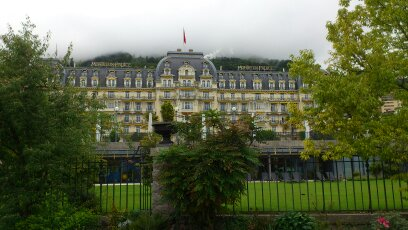 Montreux Palace 2013